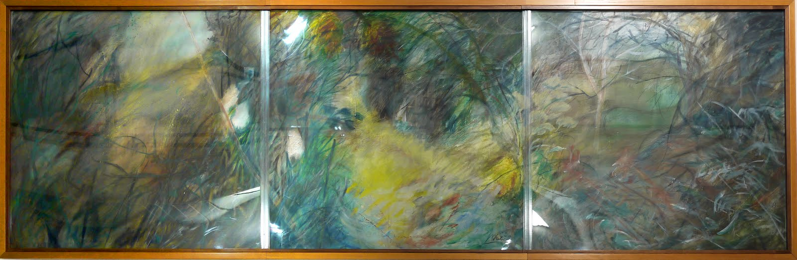 Alterlaa Kunst am Bau